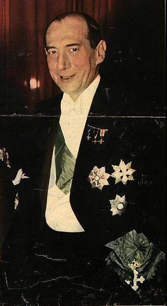 Józef Beck (przepasany Wielką Wstęgą Orderu Świętych Maurycego i Łazarza) podczas rautu w Pałacu Brühla w Warszawie (1939).